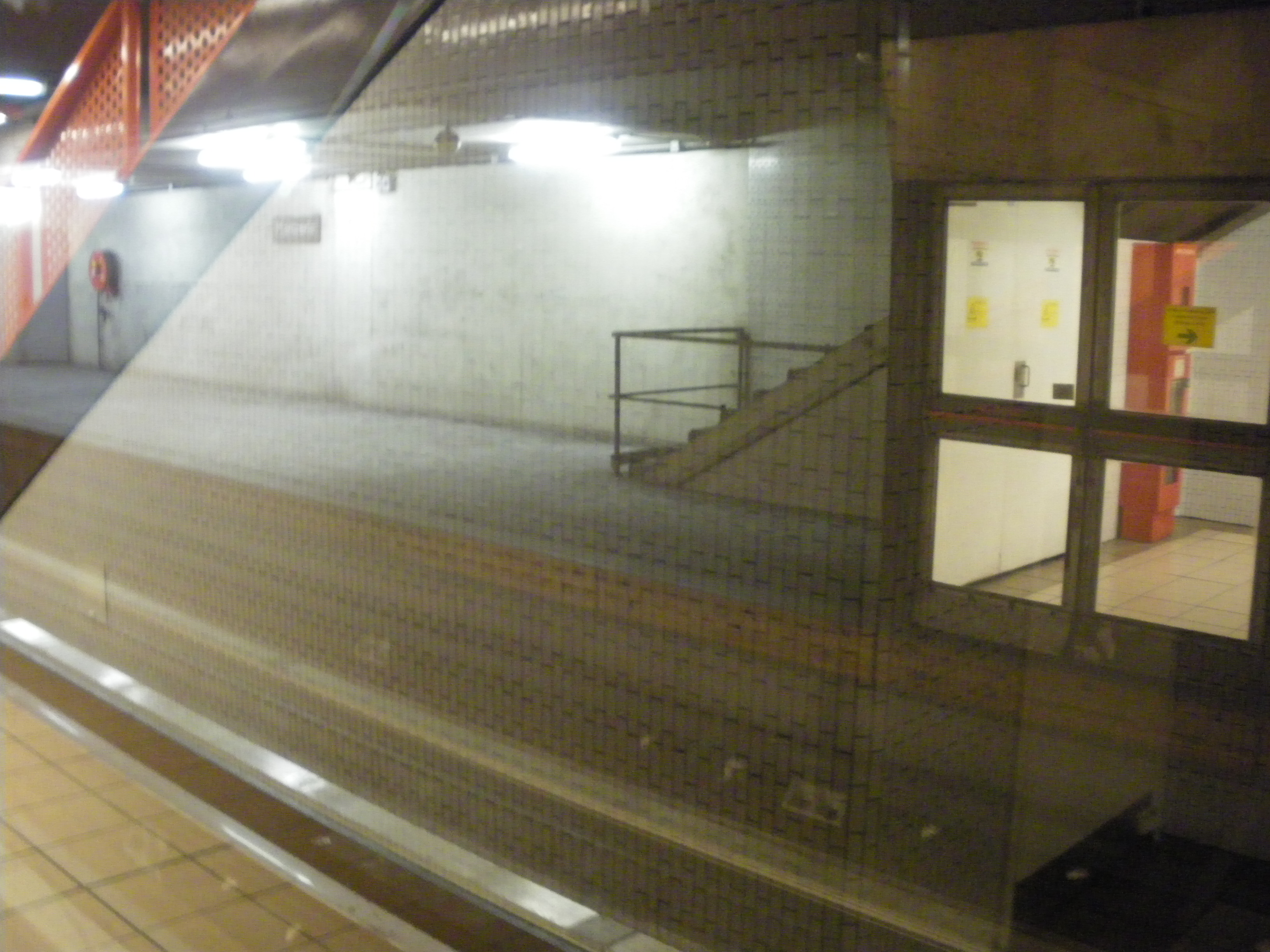 Vue du quai (direction 4 Cantons-Grand Stade) non aménagé de la station de métro "Marbrerie" de la ligne 1 du métro de Lille et située dans le quartier de Fives à Lille.